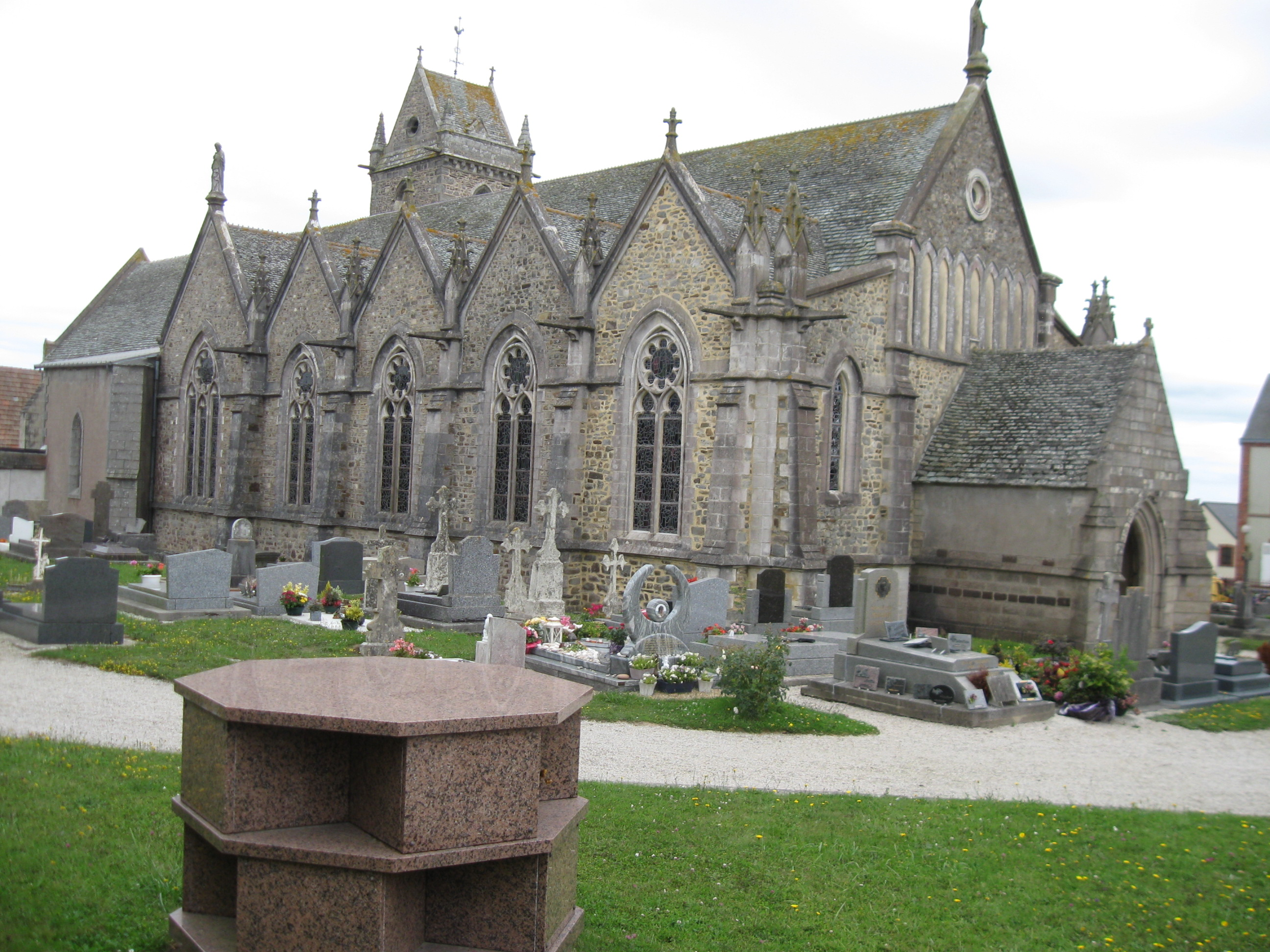 Biville (Manche, Fr) église, vue de l'ouest